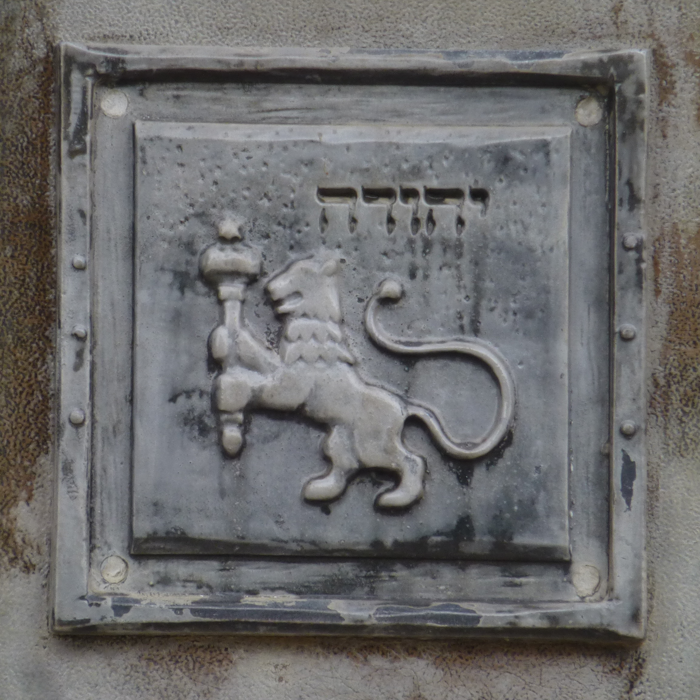 בית הכנסת הגדול "אוהל שרה" - בית הכנסת הראשון של רחובות, נבנה בשנת תרס"ד? ובהמשך שופץ והורחב והיה למוקד הקהילתי והחברתי של המושבה הצעירה.